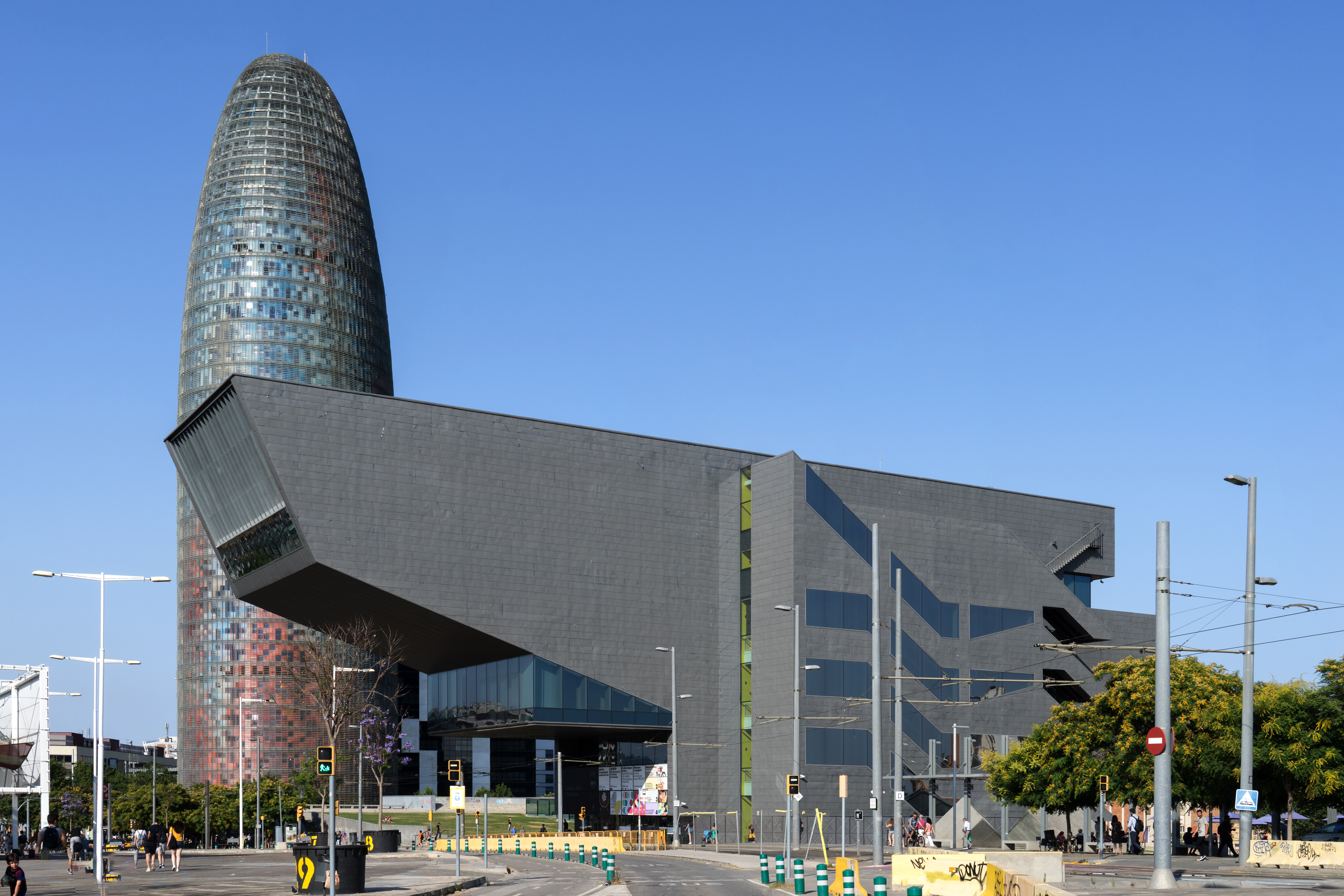 Museu del Disseny, Barcelona